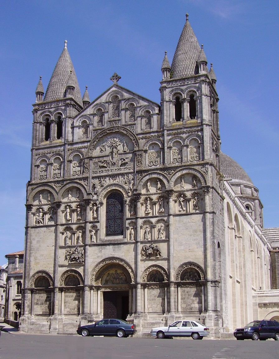 Cathédrale Saint-Pierre d'Angoulême (16000), France